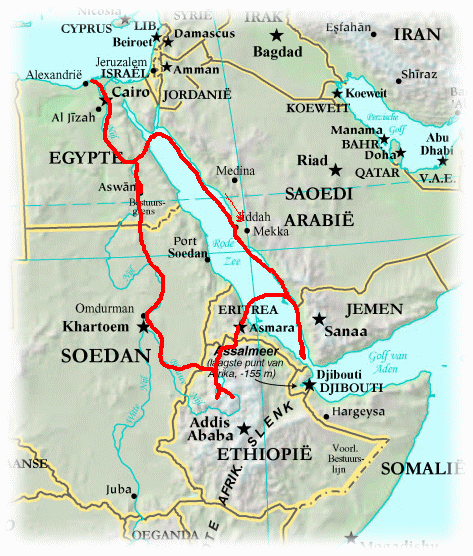 Routes van James Bruce. Gemaakt door Andre Engels op een kaart van de CIA, vertaald door Danielm. Zie nl::File:Kaart Afrika(nl).jpg voor het origineel.